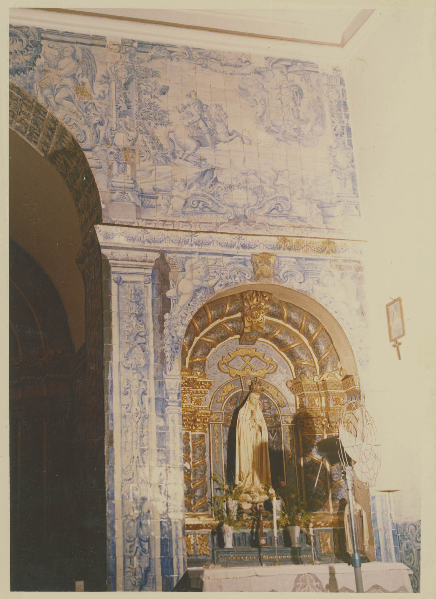 Painel ornamental e representação de milagres de Nossa Senhora. Fotógrafo: João Miguel dos Santos Simões (1907-1972). Data de produção da fotografia original: 1960-1970. [CFT009.3341.ic]